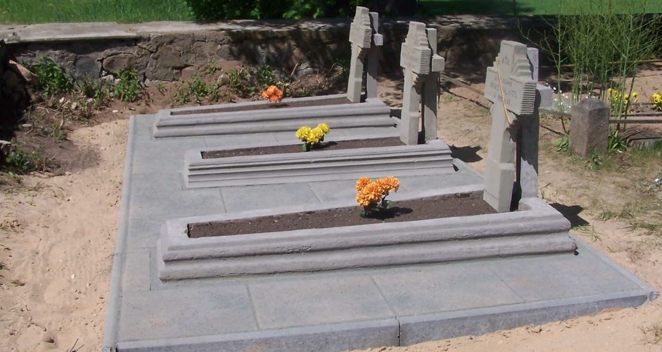 Lietuvos karių kapai Subačiuje